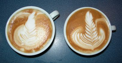 capuccino od Jacka Hanny